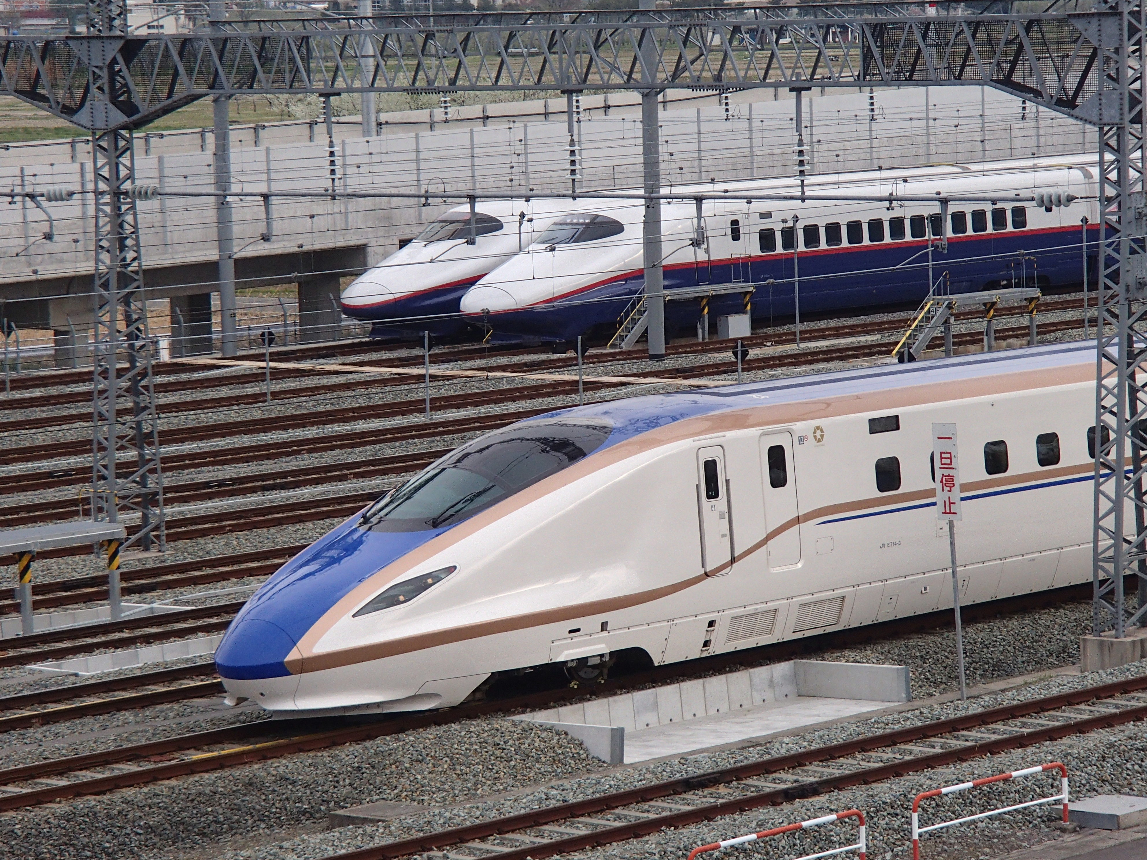 新幹線E2系及びE7系電車